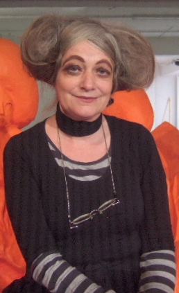 Marianne Pitzen